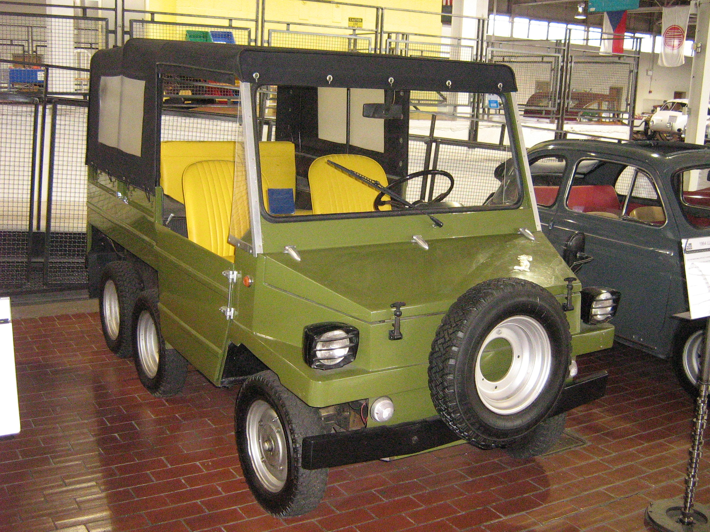 Ferrario Lucertola 500 del 1974 anche detta Fiat 500 Lucertola